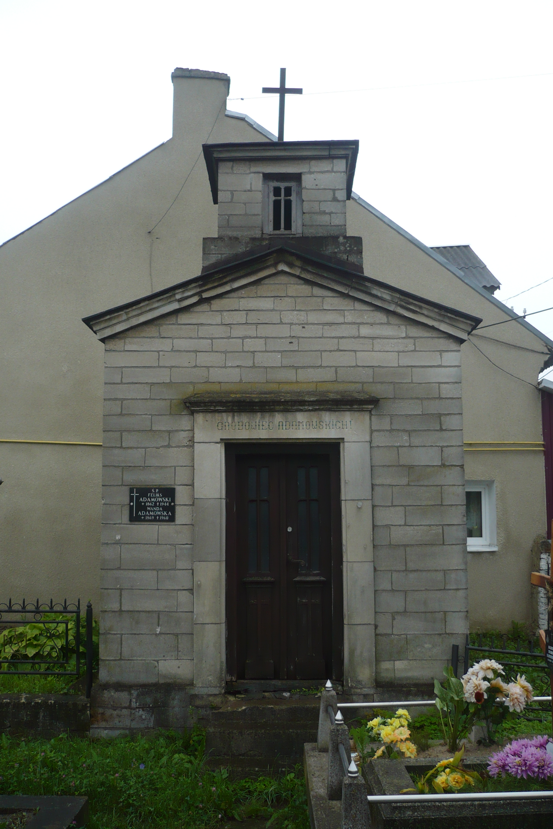 Cmentarz w Złoczowie